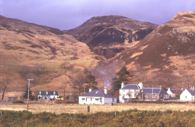 Auchtertyre